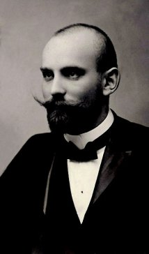 Władysław Michejda - polský právník a starosta města Těšína